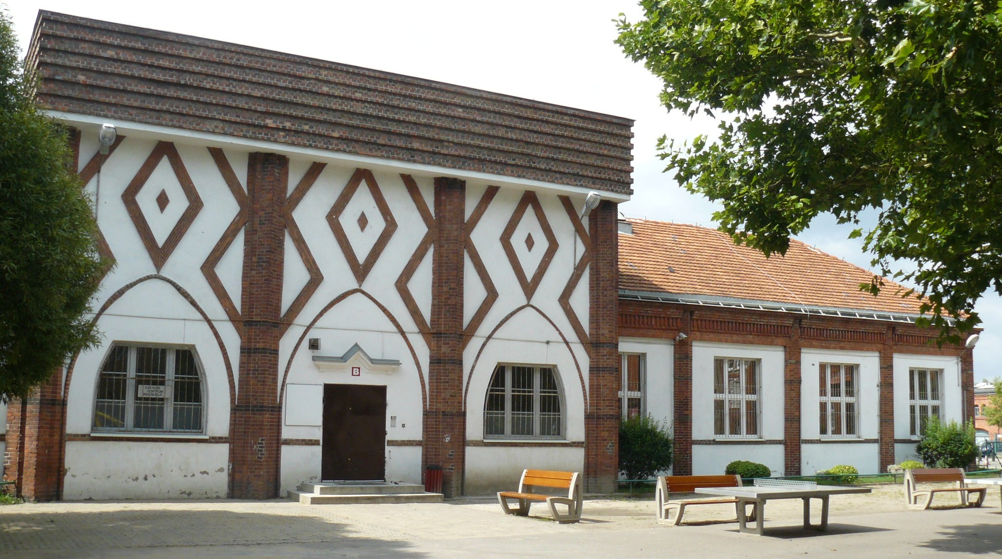 Poznań Łazarz - zespół zabudowań szkolnych (zabytek nr A 258).